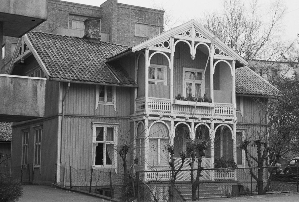 Professor Dahls gate 37. Foto: Kari Paulsen, fra Byhistorisk samling hos Oslo Museum.